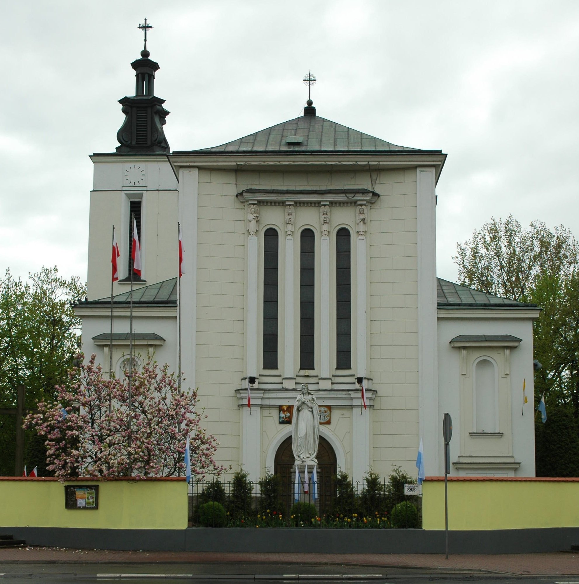 Jabłonna - Kościół pw Matki Boskiej Królowej Polski